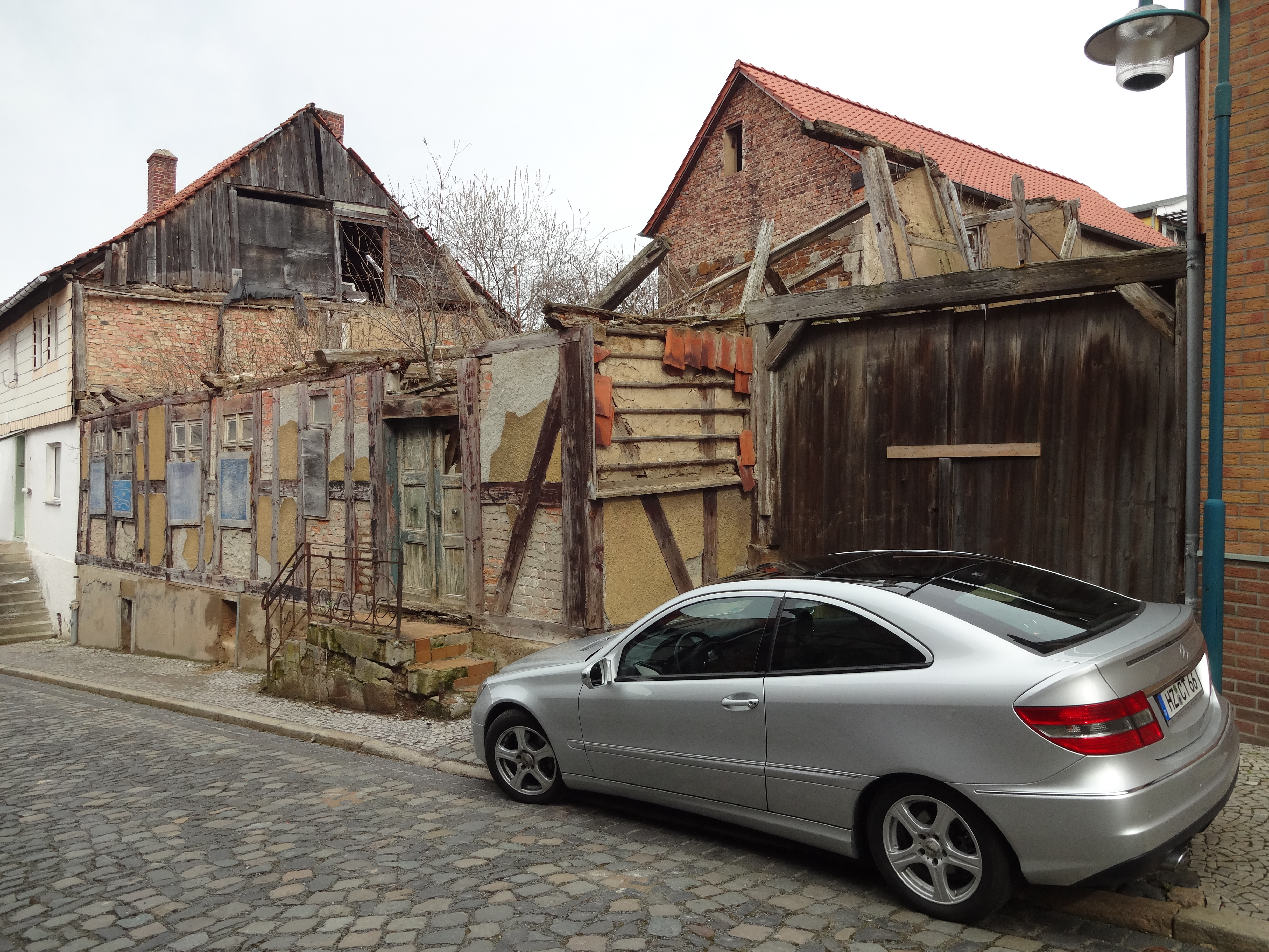 denkmalgeschütztes Fachwerkhaus in der Bergstraße 15 Derenburg, Ortsteil von Blankenburg (Harz)